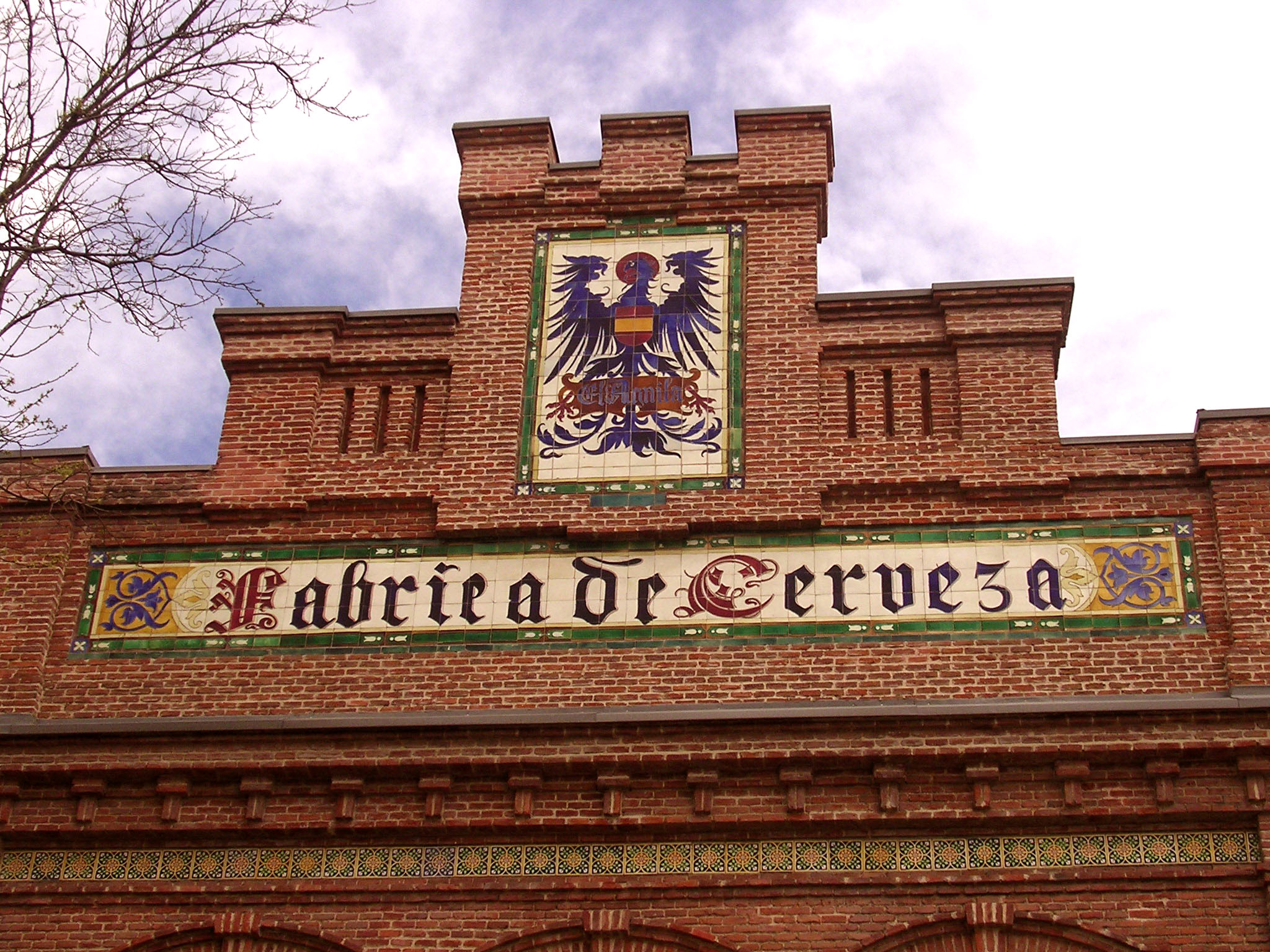 Cervecería el Aguila (aguila amstel) España- Fachada de Delicias